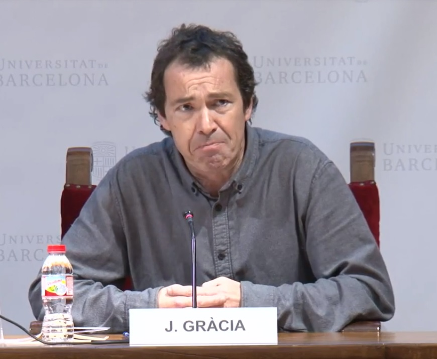 Pel·lícules i documentals: Magí Crusells, Profesor de Història Contemporània i Cine, Universidad de Barcelona Performances a l’espai públic: Imma Prieto, Professora d’Art contemporani i nous mitjans, ERAM-UdG Literatura: Jordi Gràcia, Catedràtic de Literatura espanyola, Universitat de Barcelona Noves Tecnologies: Matilde Eiroa, Professora d’Història Contemporània, Universitat Carlos III Presenta i modera: Marina Vinyes